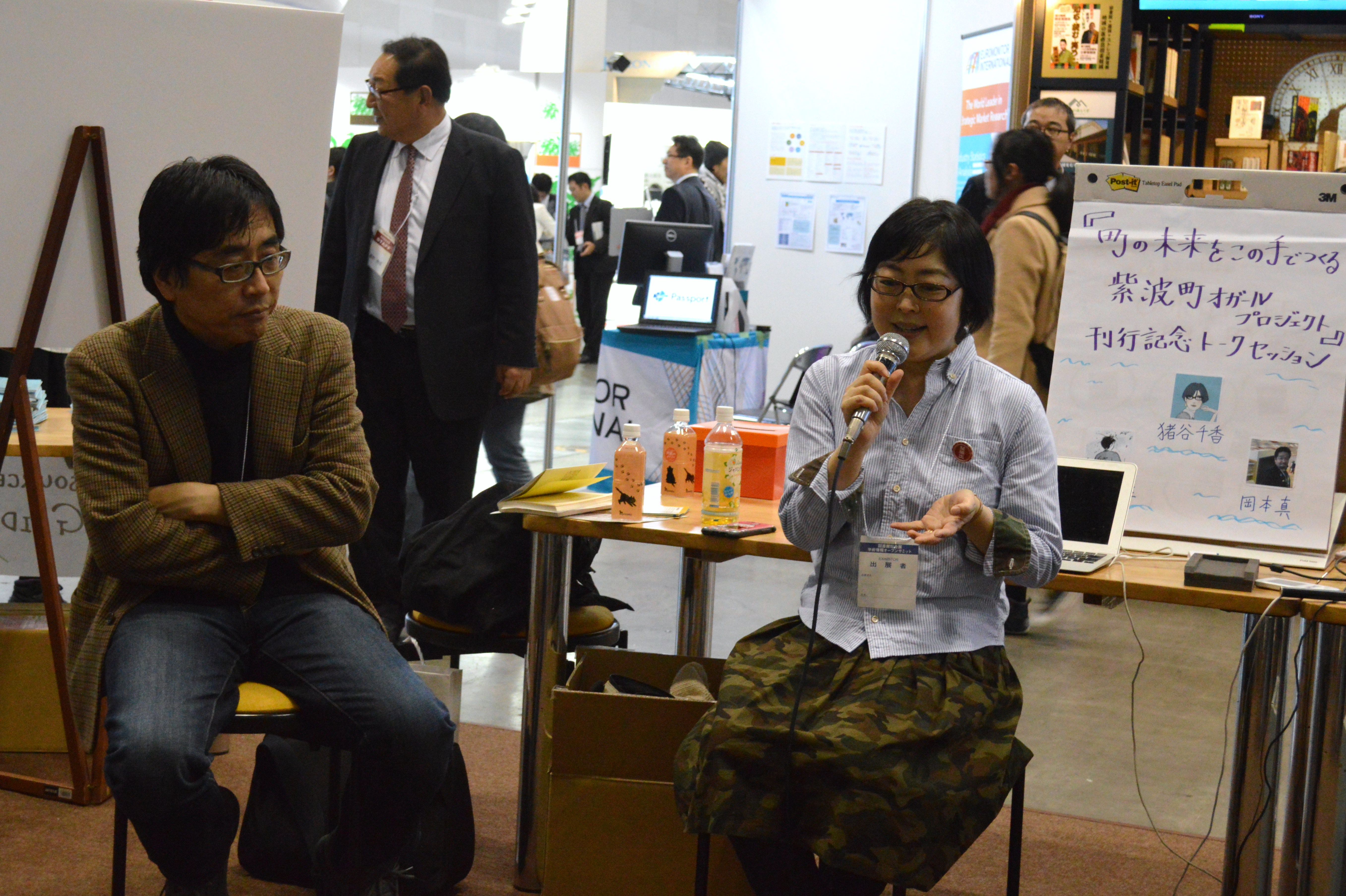 パシフィコ横浜で開催された図書館総合展2016最終日。アカデミック・リソース・ガイドのブースで行われた、猪谷千香（右）のトークセッション。仲俣暁生（左）が司会を務めた。